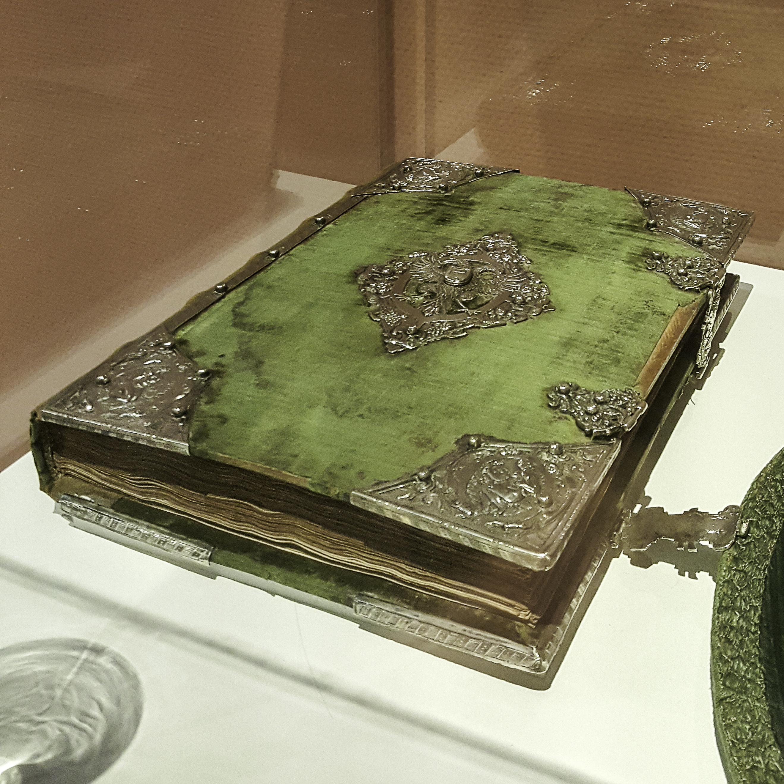 Het stadboek van Groningen met de stadswetten uit de 15e eeuw. In 1600 verfraaid met zilverbeslag.